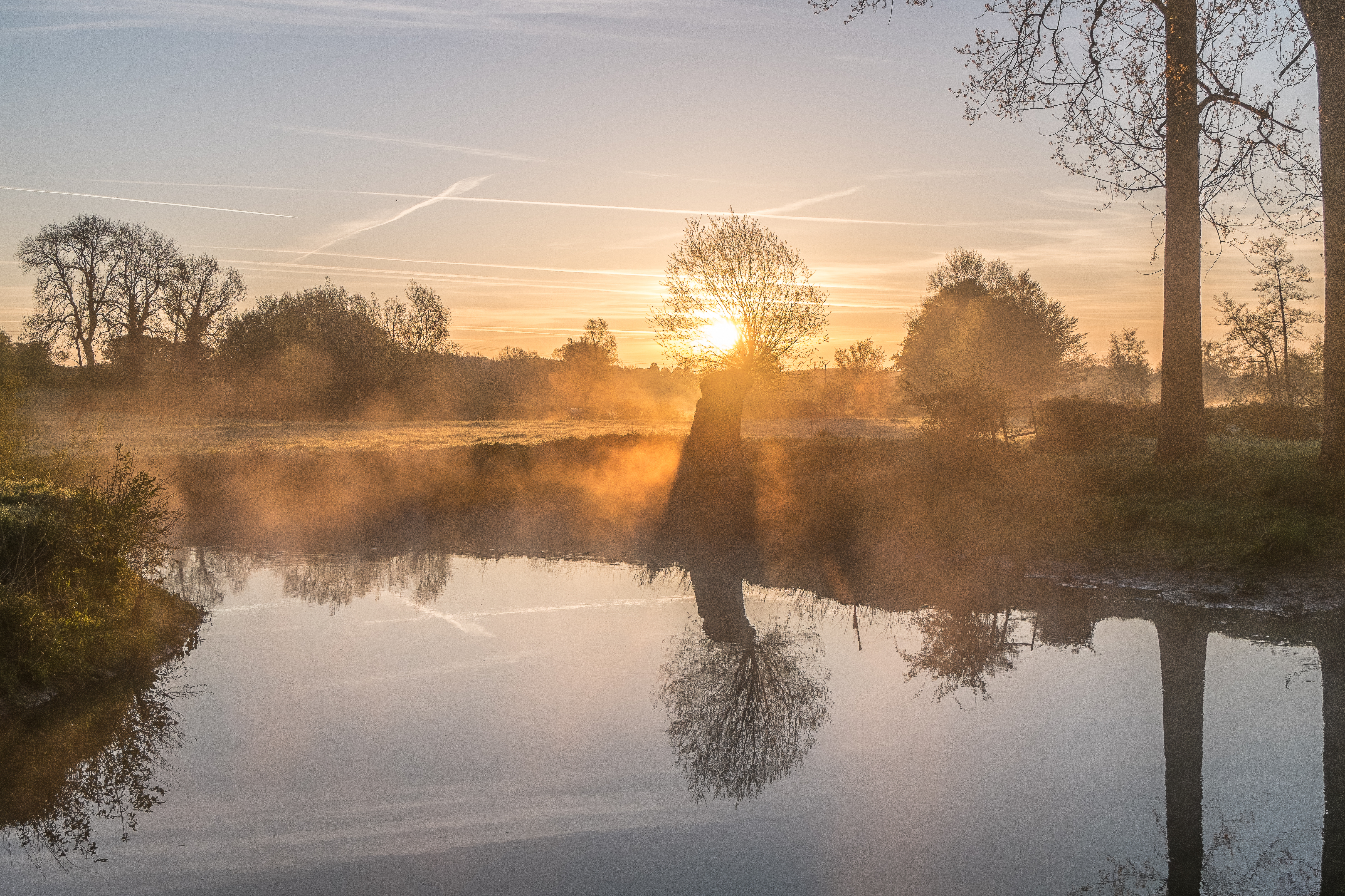 Rituel solaire, brumeux et printanier, dans la vallée (de l'Helpe Majeure).